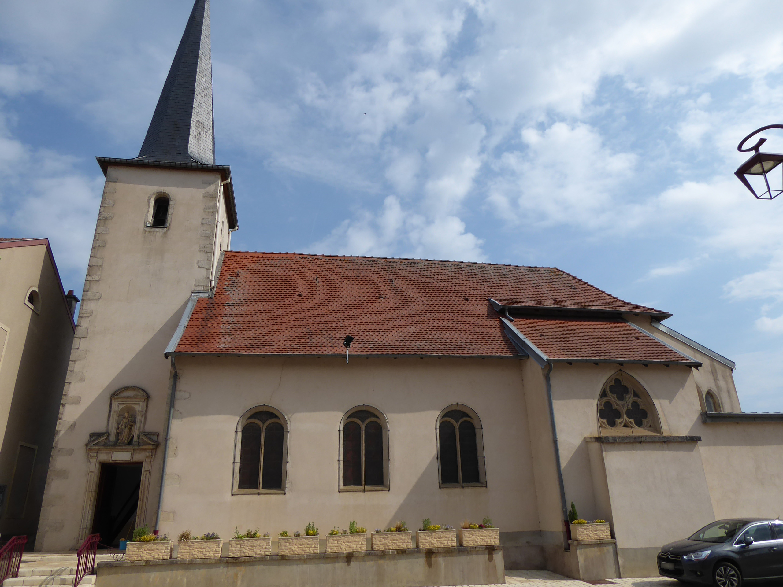 Face sud de l'église de Laneuvelotte en Meurthe-et-Moselle (France). Portail d'entrée.